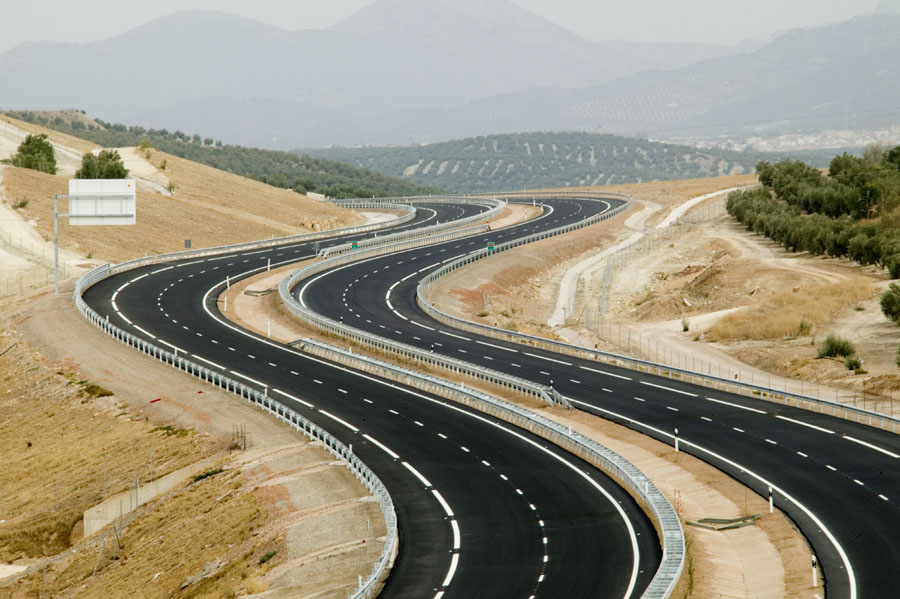 Tramo en servicio de la Autovía del Olivar (Jaén)